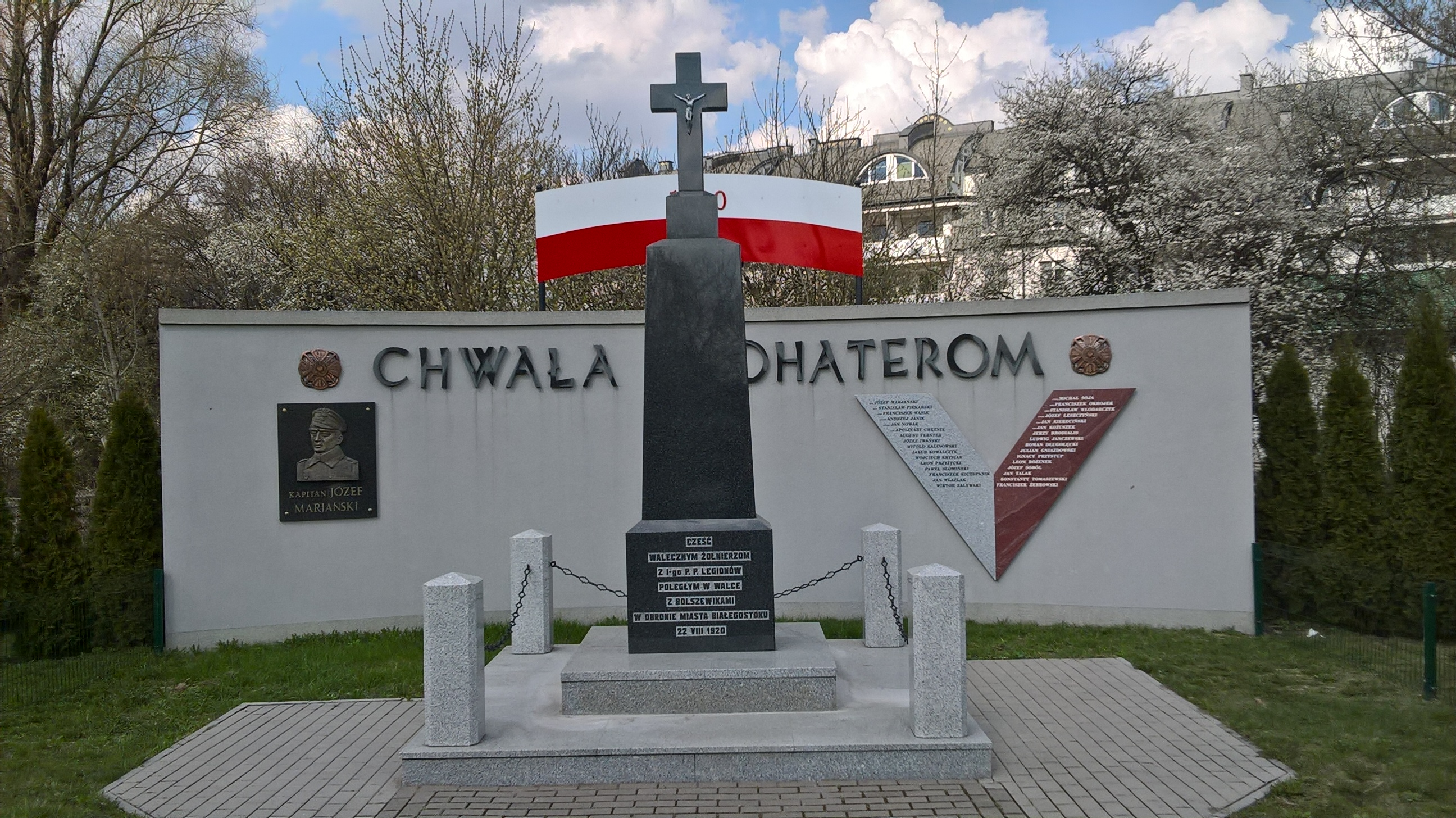 Pomnik poświęcony poległym żołnierzom 1. Pułku Piechoty Legionów podczas bitwy białostockiej w dniu 22 sierpnia 1920 r.